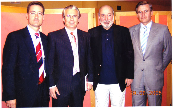 Foto de el Sr. José Daniel Barquero con el Juez Baltasar Garzón y el Juez Chileno De Guzman